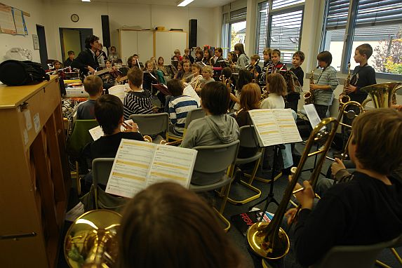 Schule